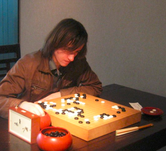 Andrij Kravets, 2012